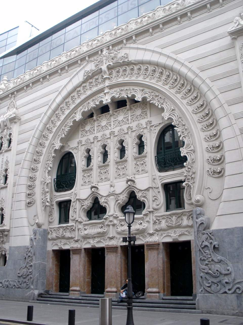 Bilbao - Teatro Campos Eliseos